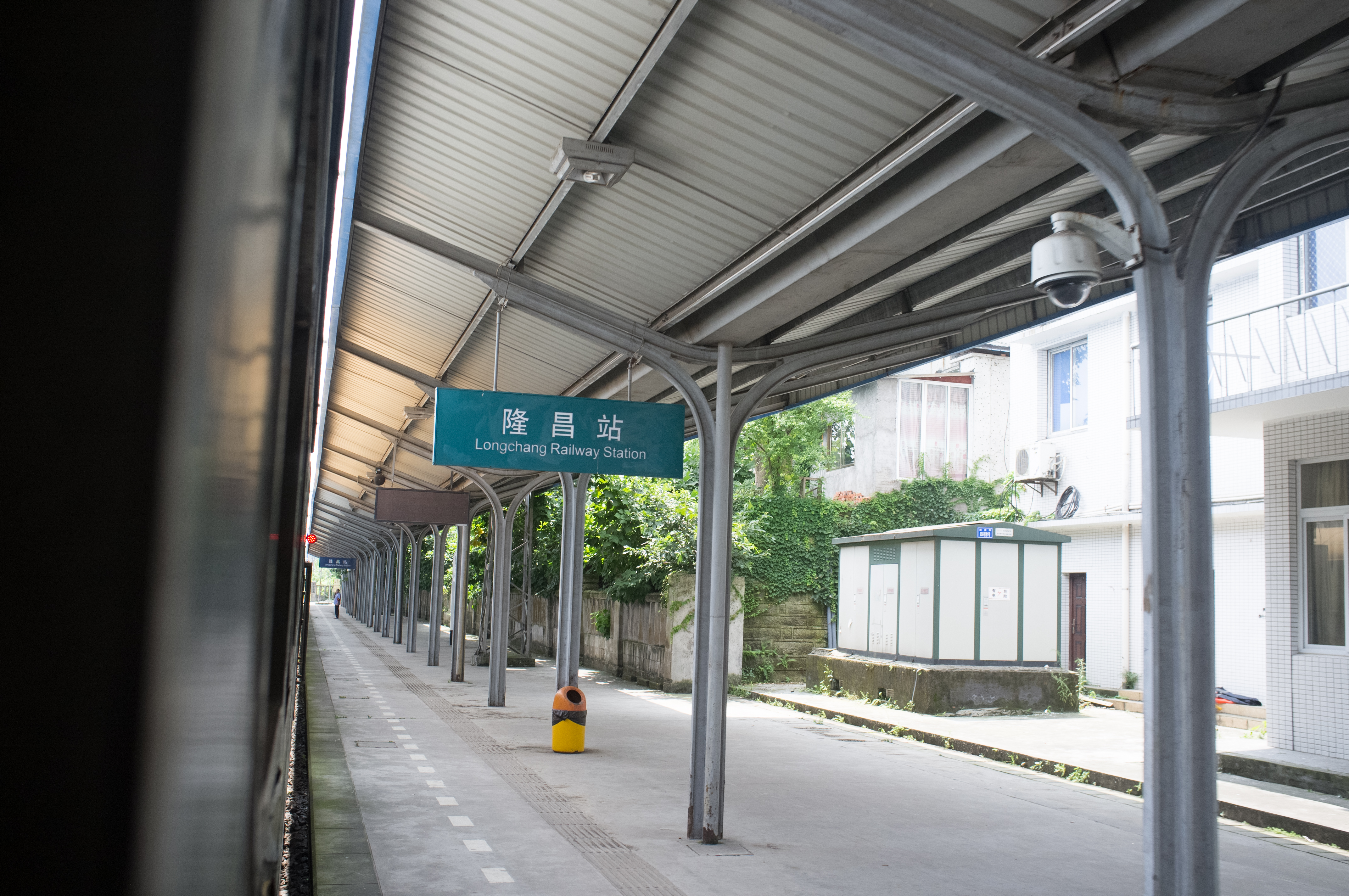 中文（中国大陆）: 成渝铁路隆昌站